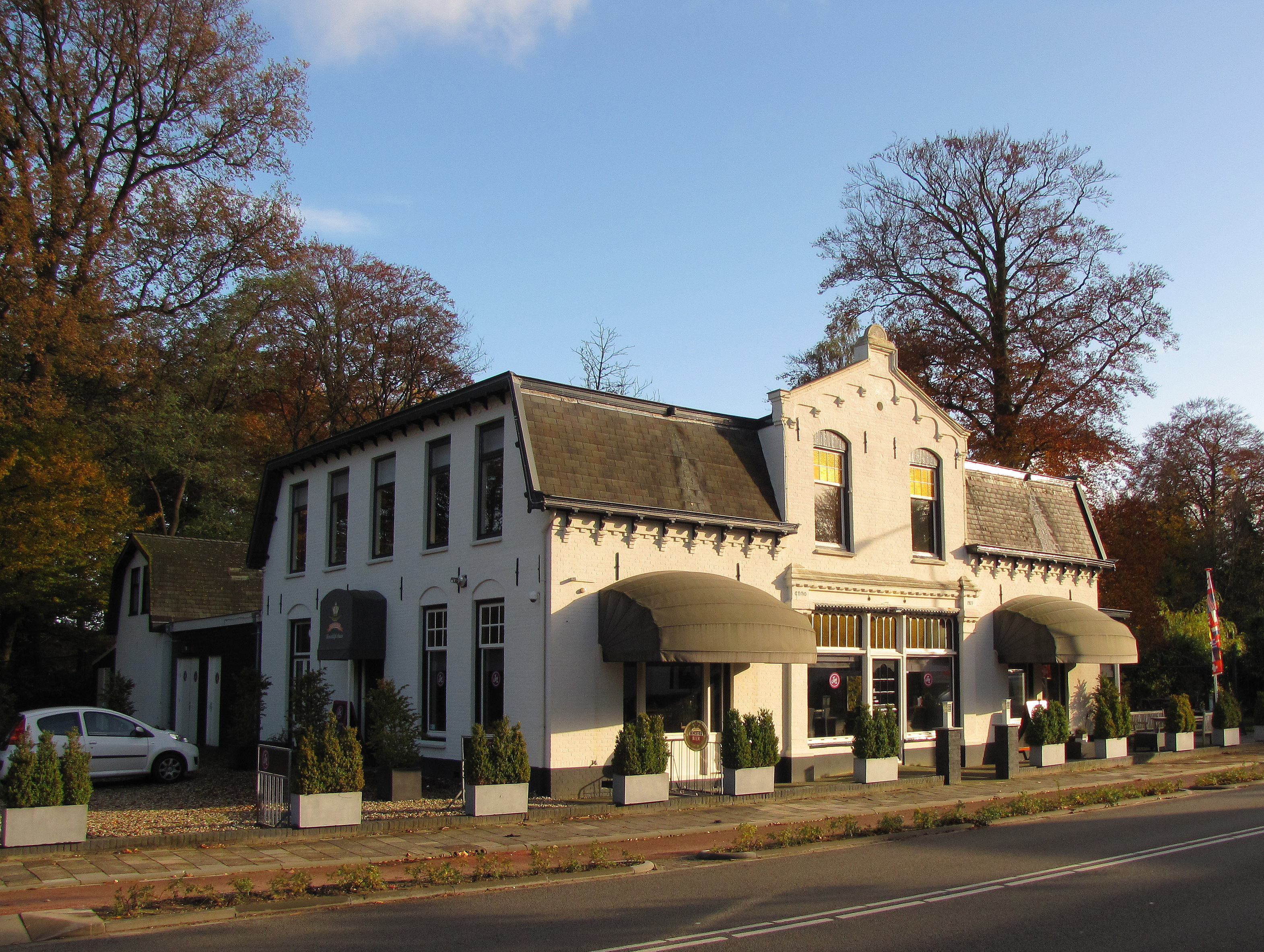 Café Soestdijk, Vredehofstraat 4-6 te Soest noordwestzijde.